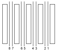 Sporen en perrons van Station Amsterdam Bijlmer Arena